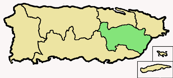 Mappa della diocesi cattolica di Caguas, a Puerto Rico. Anno 2009.